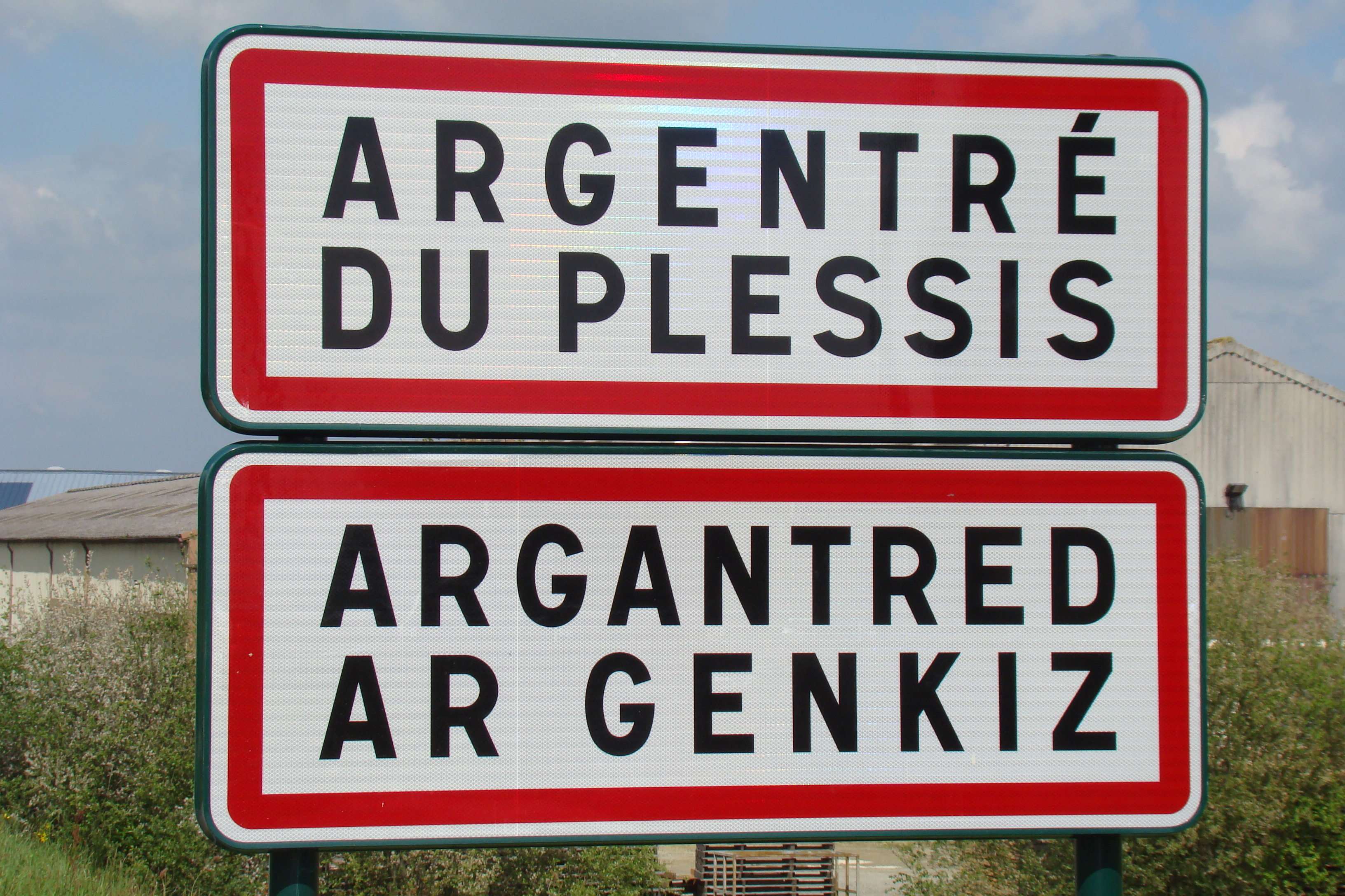 Panell divyezhek ar gumun